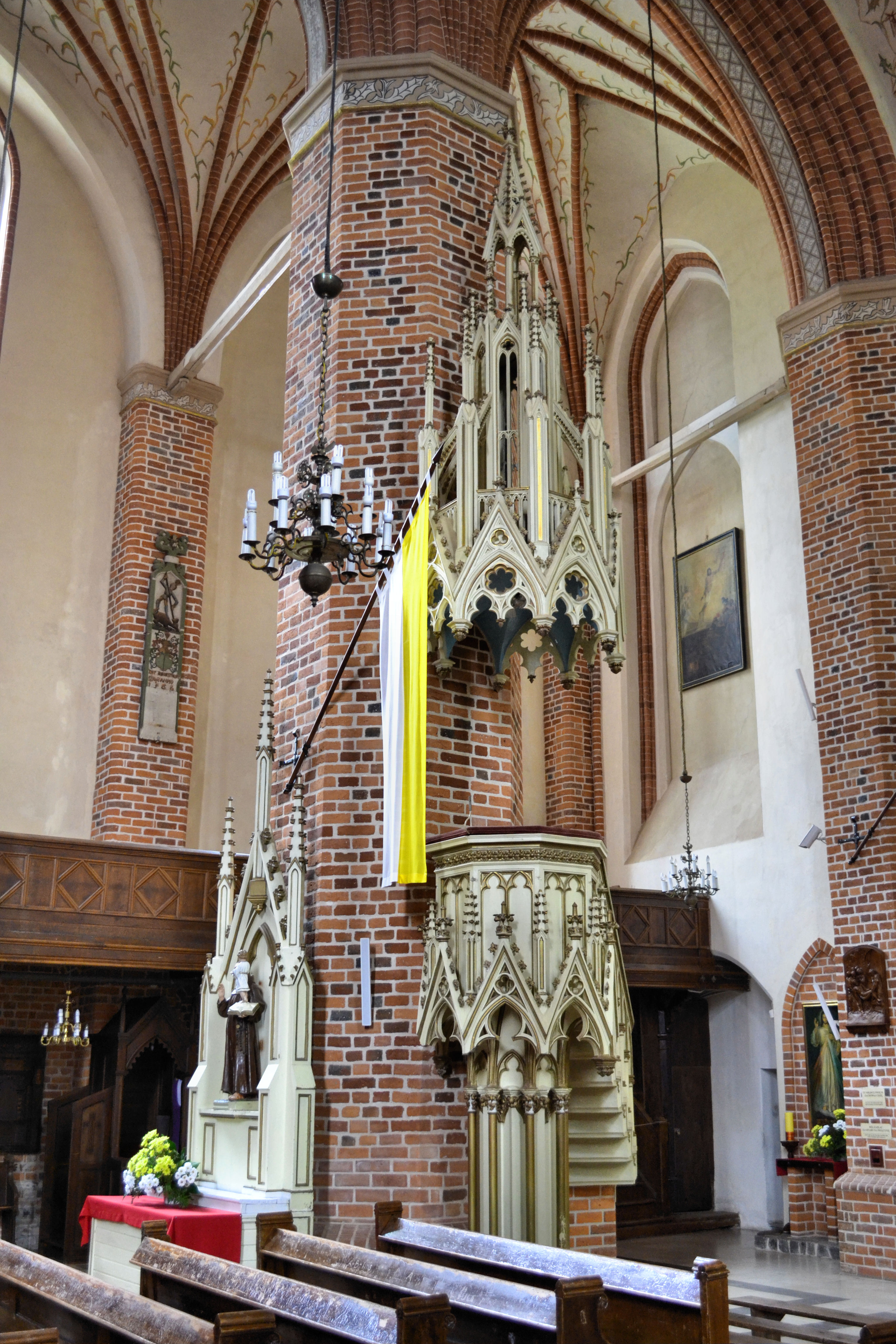 kościół Macierzyństwa NMP Trzebiatów